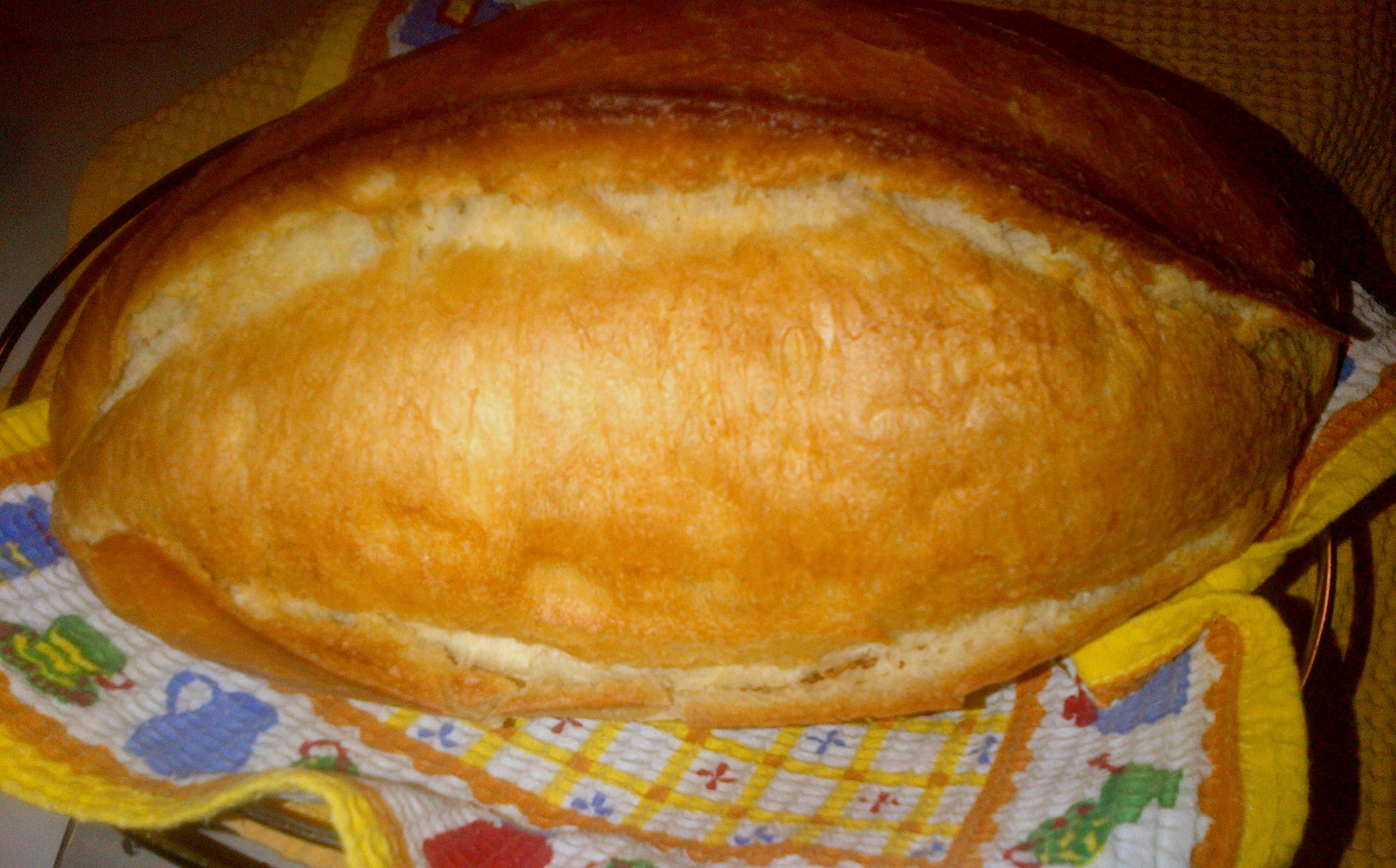 "Francala" o "baston" es el pan tipico y mas consumido en las ciudades y pueblos de Turquia.